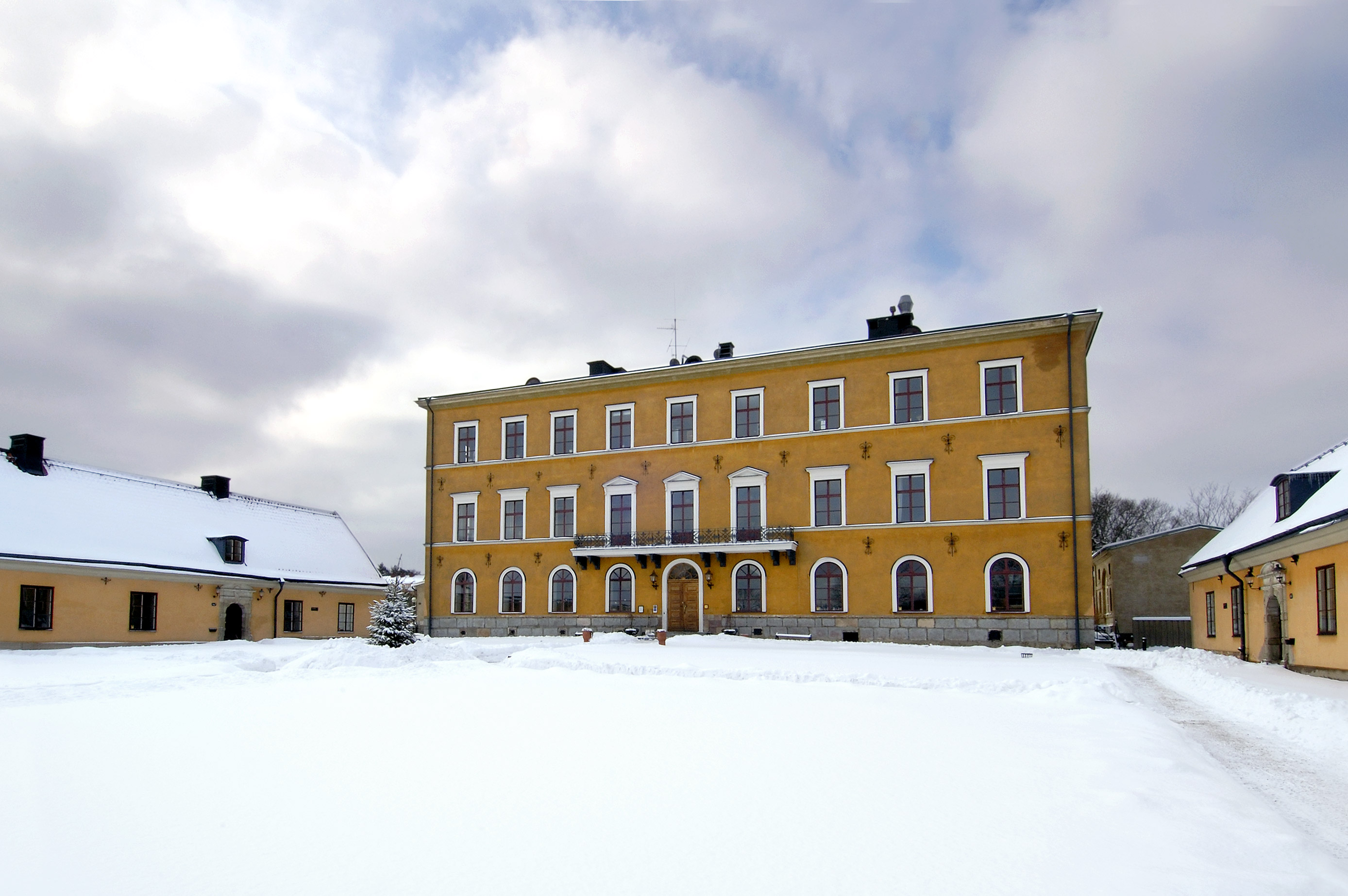 Ulvsunda slott i Bromma i nordvästra Stockholm